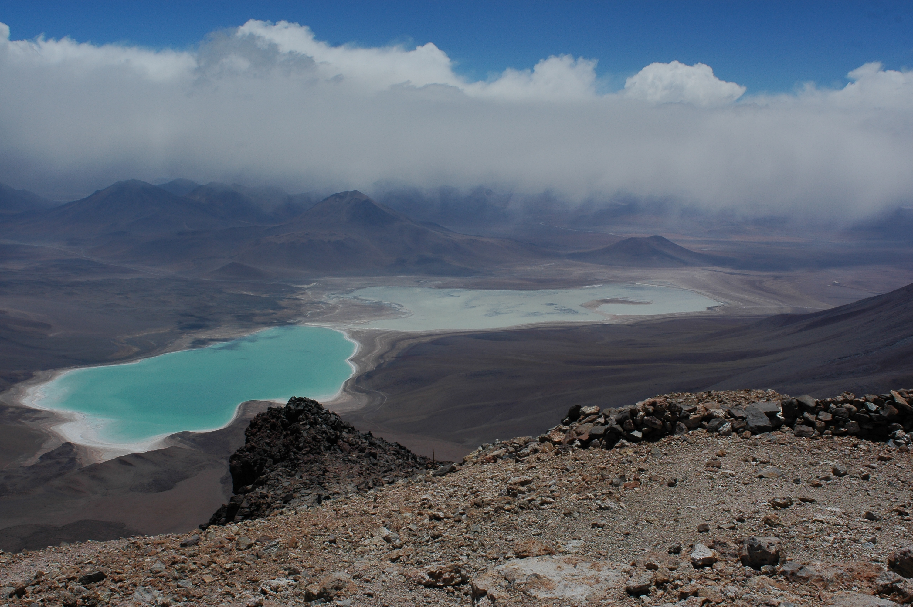 Luego de un gran esfuerzo fisico , vemos esta vista desde la cumbre del volcan Licancabur, el cual contiene en su crater la laguna mas alta del mundo.